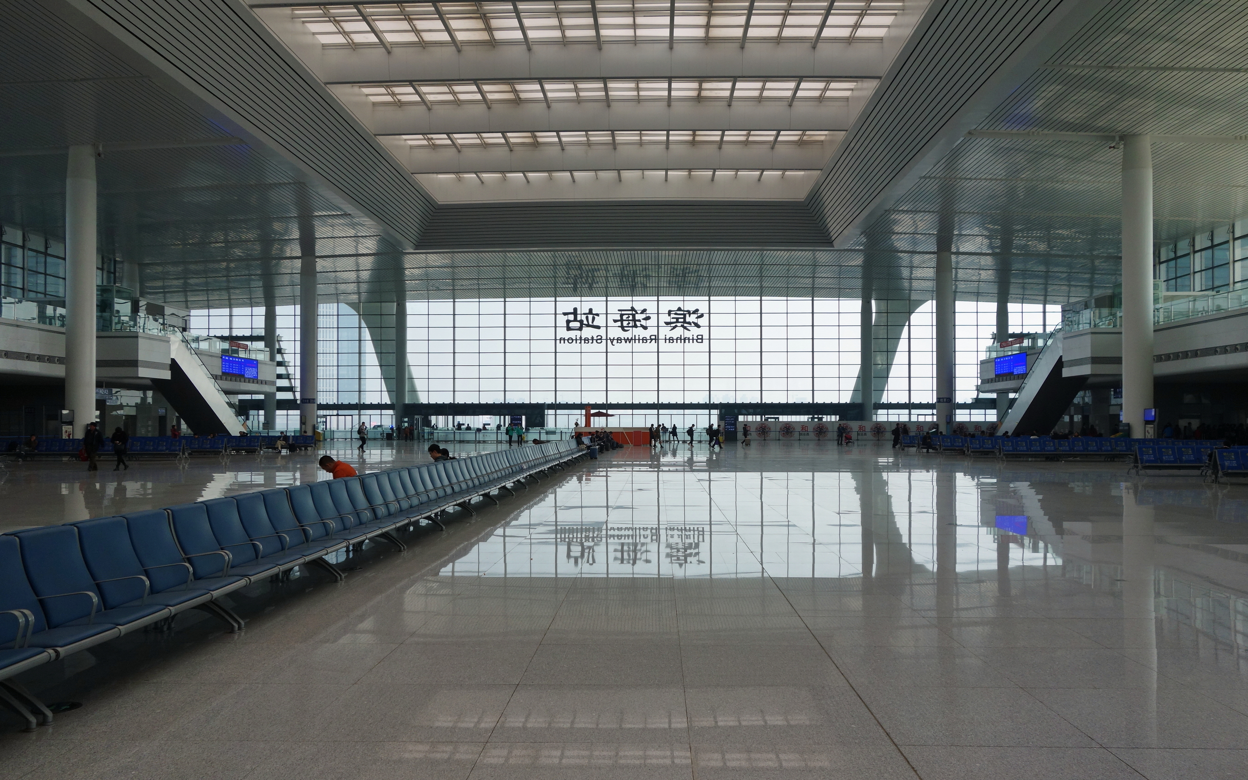 天津滨海站候车大厅